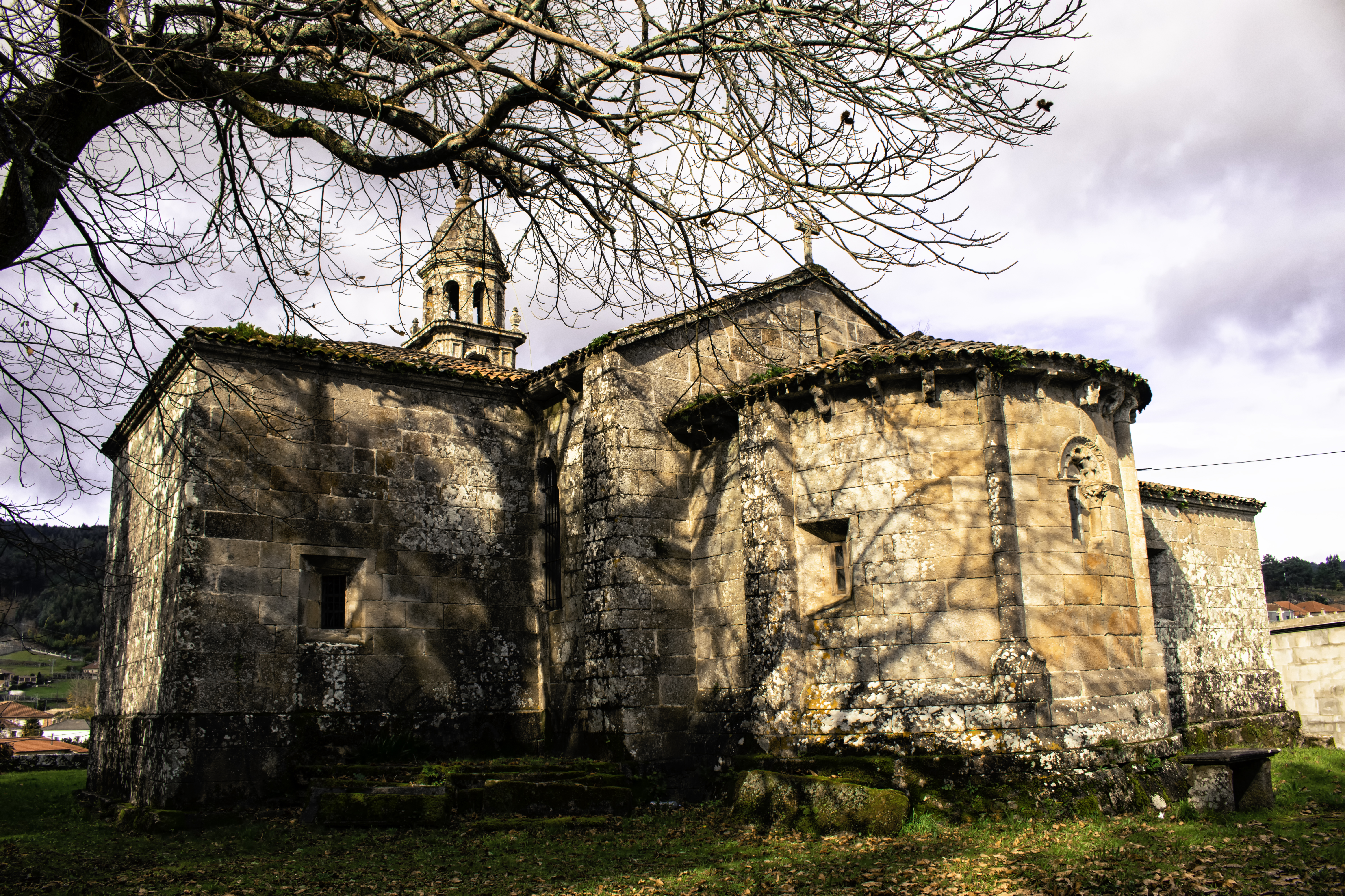 Igrexa de San Miguel do Campo, Campo Lameiro.